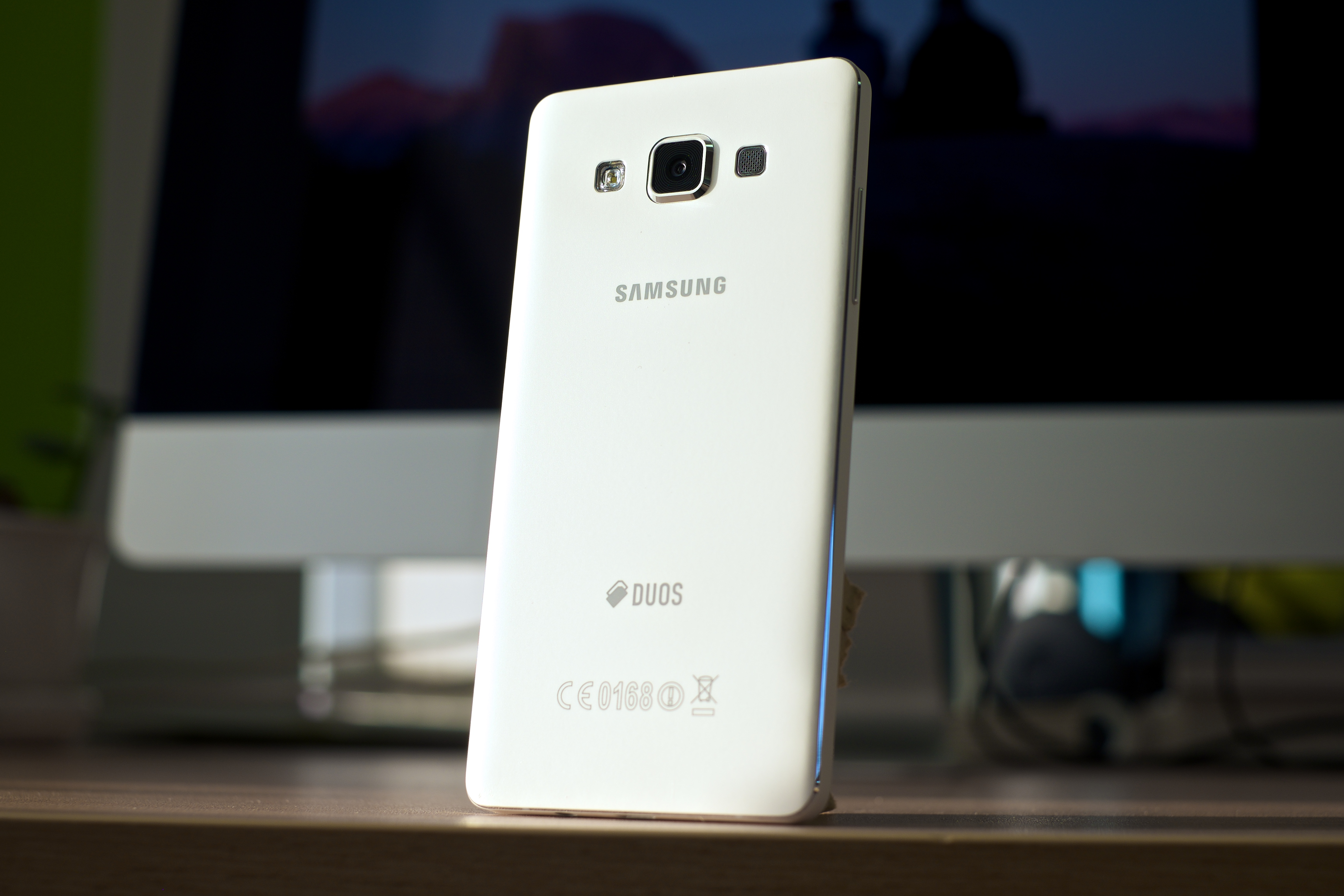 Samsung Galaxy A5